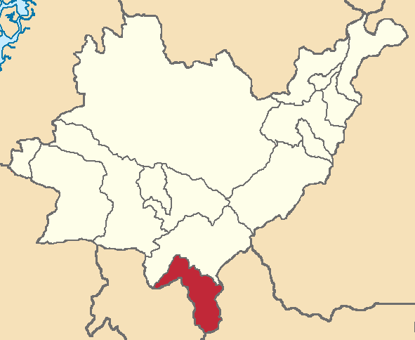 Mapa localizacor del cantón en Azuay, Ecuador